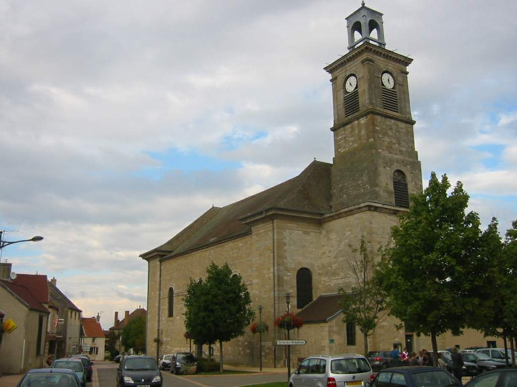 Eglise de Marsannay la Cote en Bourgogne